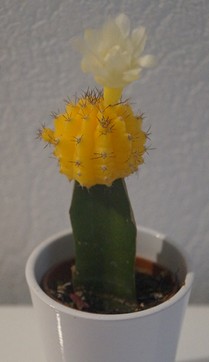 Mój_żółty_kaktusik_(Gymnocalycium_mihanovichii_(zraz)_na_podkładce_Hylocereus_undatus)